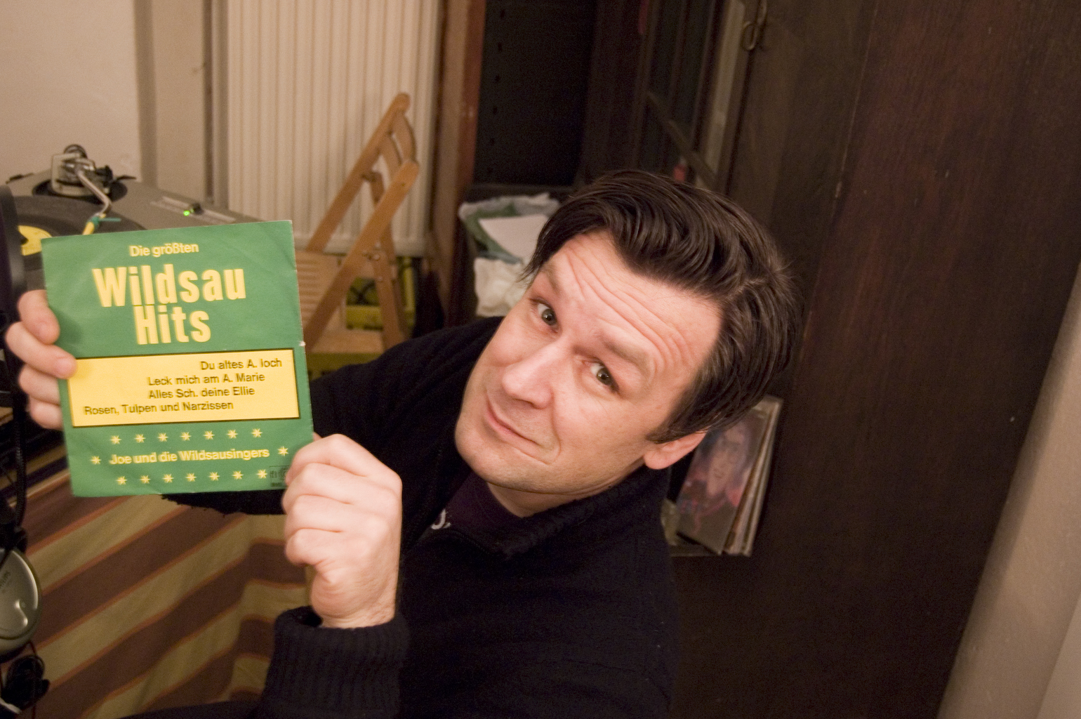 Andreas Michalke am 16. Februar 2010 in Berlin bei der Radiosendung "Berlin beatet Bestes" im Studio bei Herbstradio/Kinofunk.